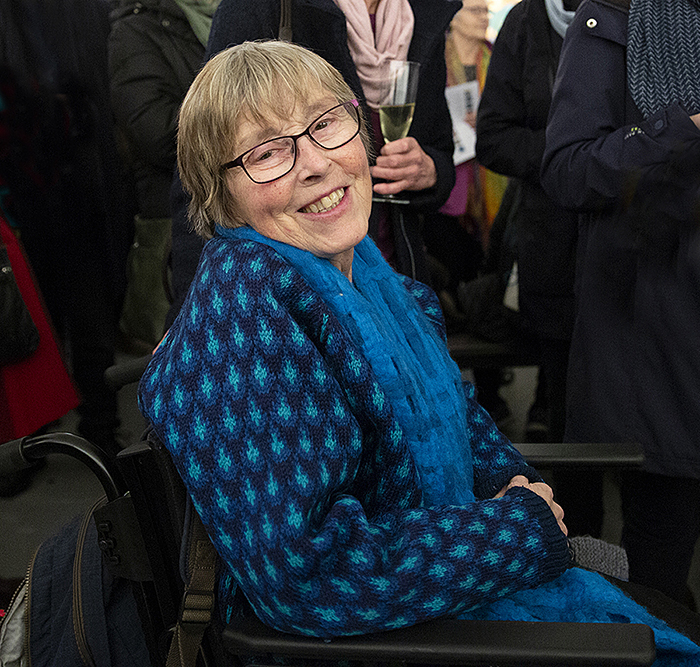 Den norske maleren Solrunn Rones fotografert på åpningen av hennes utstilling «Begynnelser» i Dropsfabrikken, Trondheim 11. januar 2020